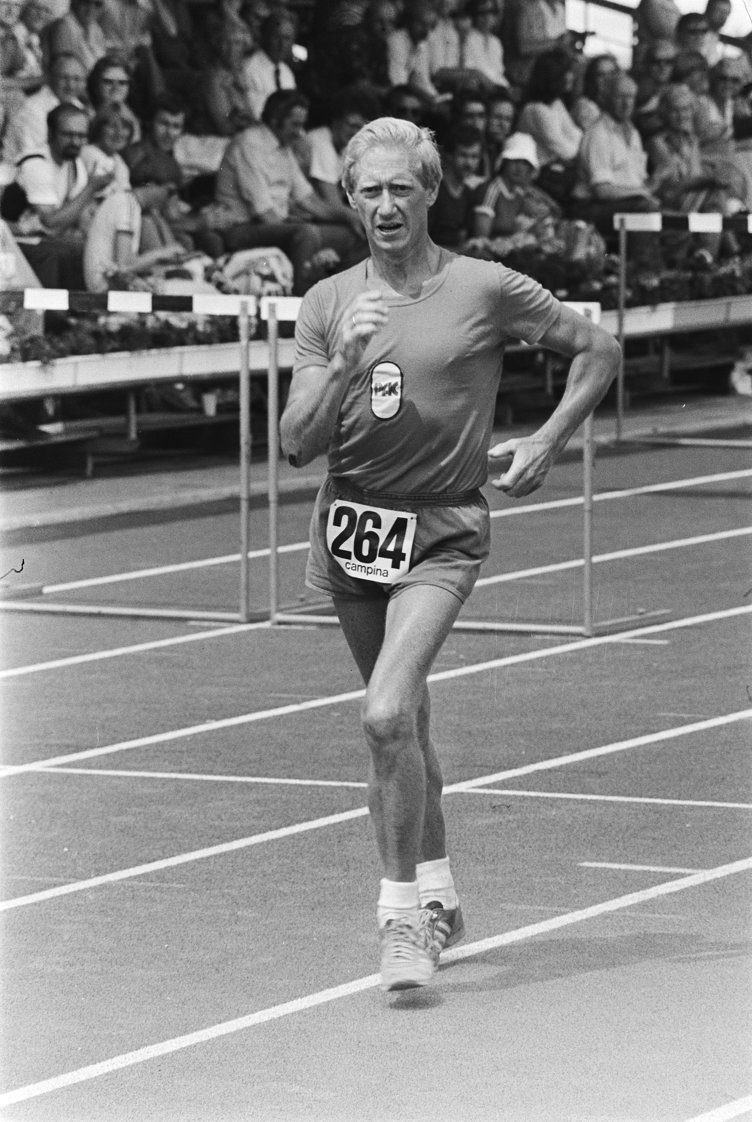 Collectie / Archief : Fotocollectie Anefo Reportage / Serie : [ onbekend ] Beschrijving : Nederlandse atletiekkampioenschappen in Sittard; Tjabel Nas snelwandelt naar zijn titel Datum : 10 juli 1977 Trefwoorden : atletiek Fotograaf : Verhoeff, Bert / Anefo Auteursrechthebbende : Nationaal Archief Materiaalsoort : Negatief (zwart/wit) Nummer archiefinventaris : bekijk toegang 2.24.01.05 Bestanddeelnummer : 929-2613